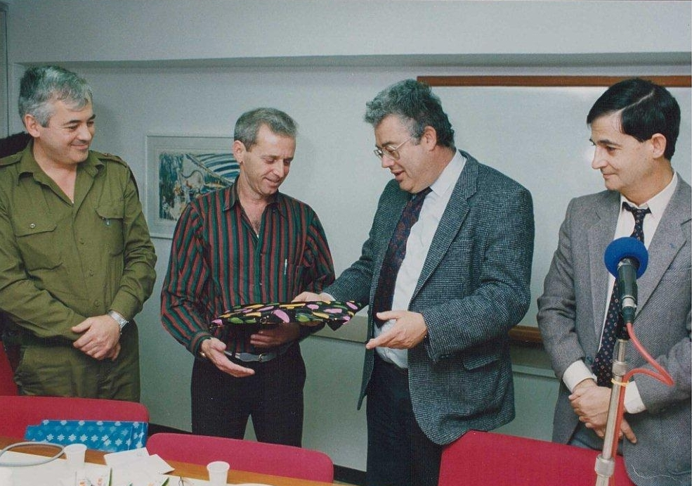 טקס סיום איחוד שידורים בין קול ישראל וגלי צה"ל בתקופת מלחמת המפרץ - 1.3.1991 מימין אמנון נדב, מנהל קול ישראל, אריה מקל, יו"ר רשות השידור, אפרים לפיד מפקד גלי צה"ל , סא"ל שלמה כסיף, רע"נ טכני גלי צה"ל.